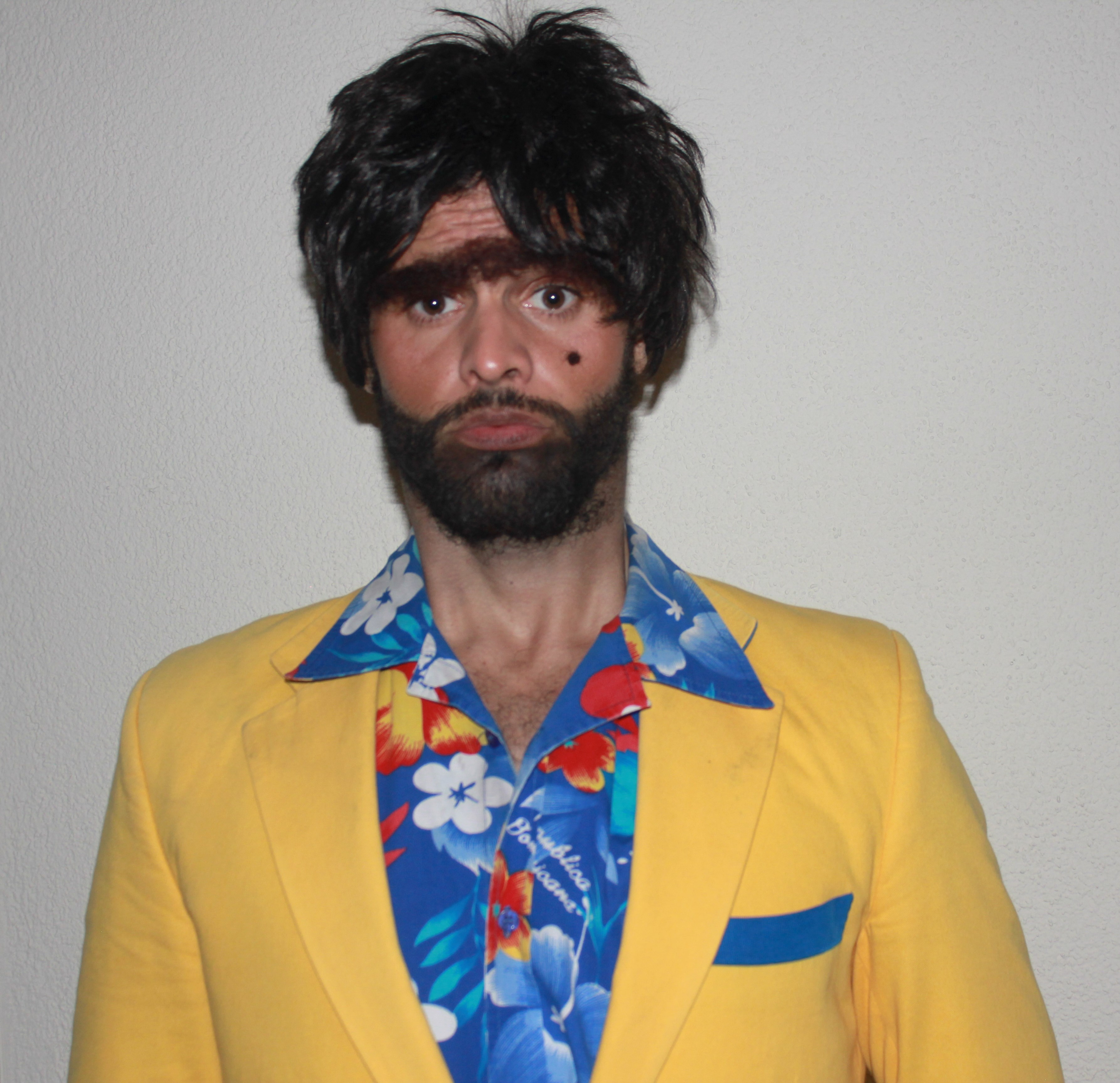 Der Schweizer Komiker Semih Yavsaner alias Müslüm (2015)